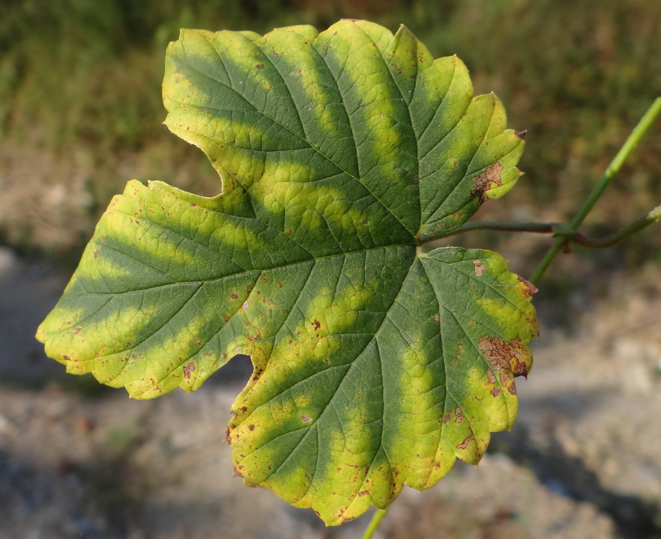 Pseudoperonospora cubensis on Humulus lupulus. Location: Poland, Gdów